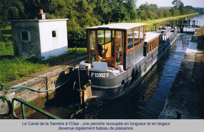 Le canal de la Sambre à l'Oise emprunté par les bateaux de plaisance hélas aujourd'hui impraticable car barré à cause de 2 ponts canaux à refaire